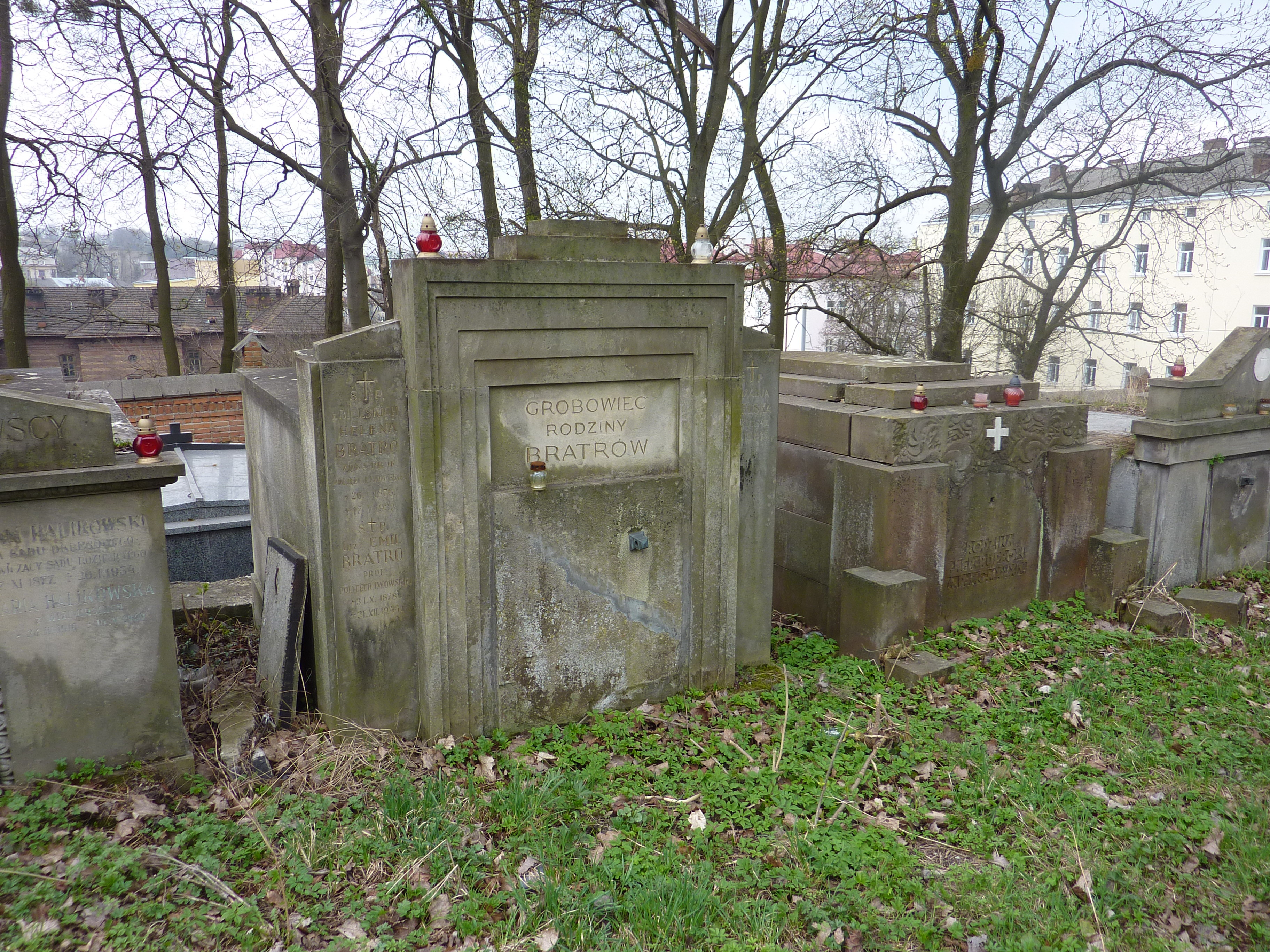 Grób prof. Emila Bratro na cmentarzu Łyczakowskim